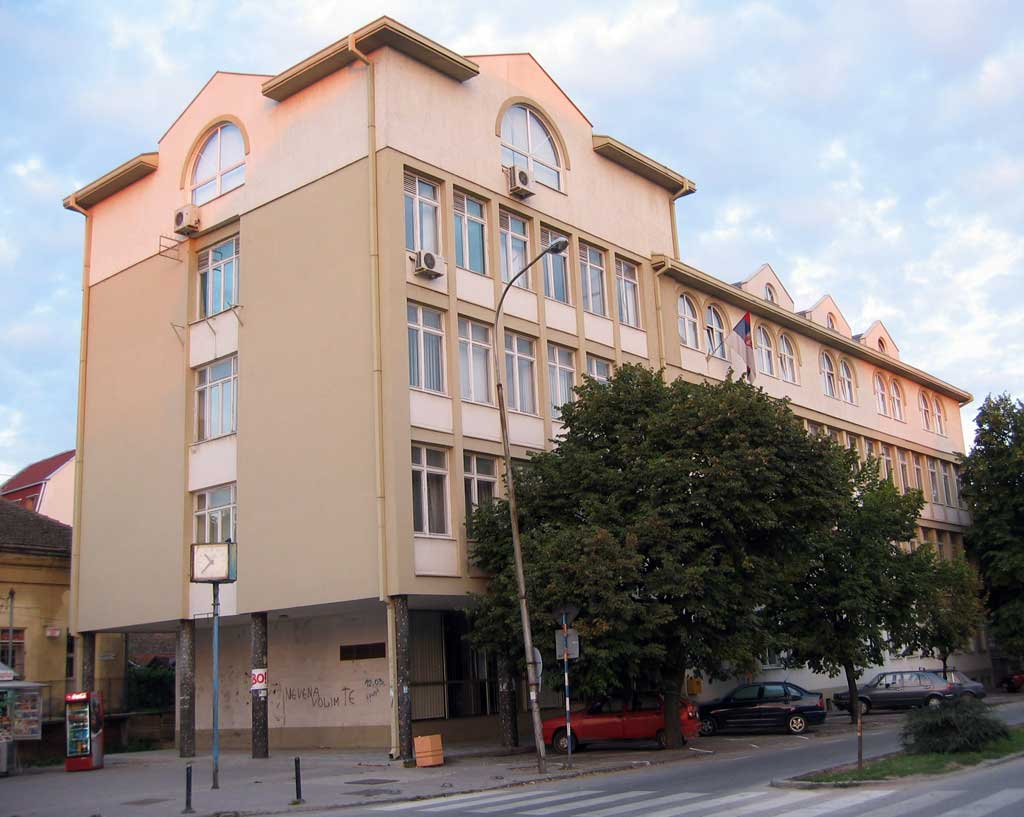 Зграда суда у Смедеревској Паланци